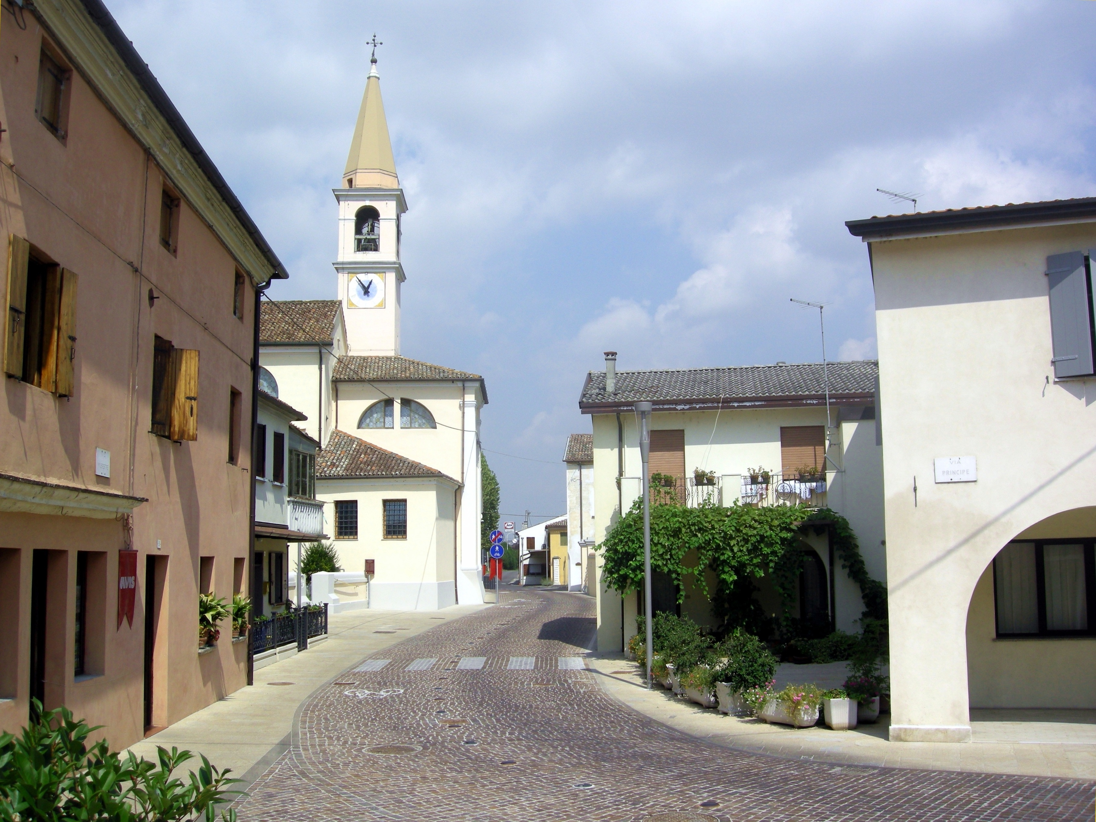 Cervellin, opera propria, Veduta di Musestre borgo (Roncade), lic. GFDL, data 28/08/2009